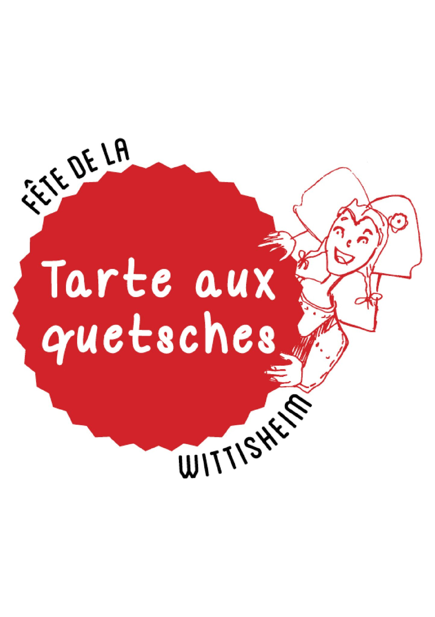 Logo de la fête de la Tarte aux quetsches, fête qui attire un millier de visiteurs.